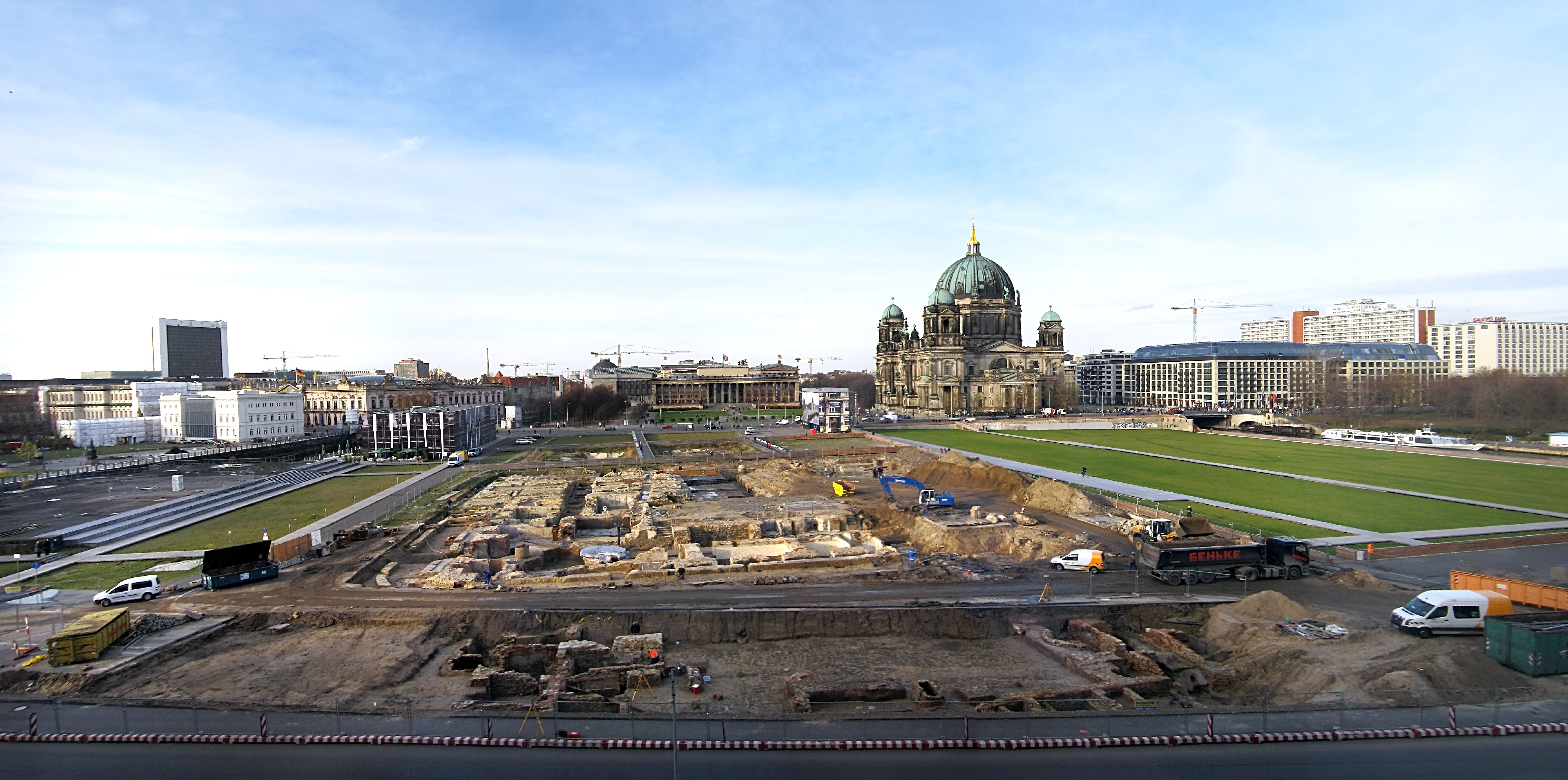 Schlossplatz in Berlin